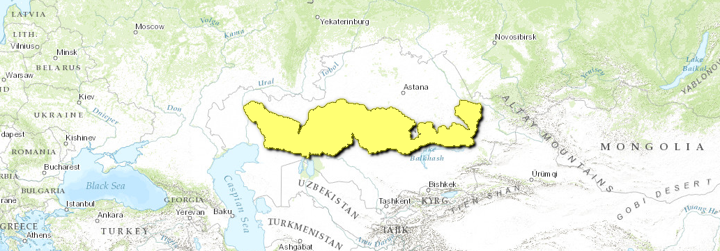 Mappa Ecoregione PA1318 - Semi-deserto del Kazakistan